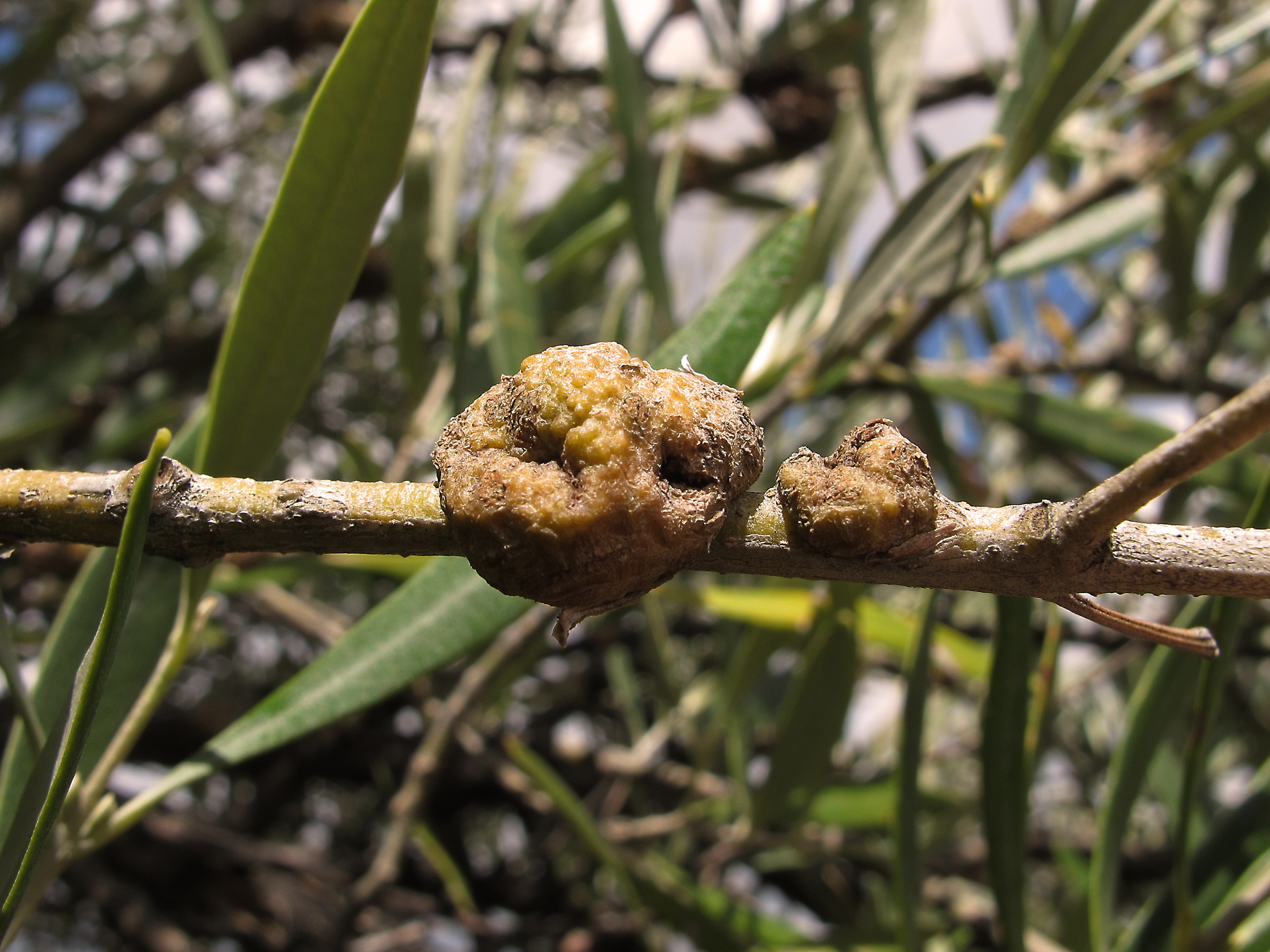 Sobre rama de olivo Lo produce unas bacterias que penetran por heridas causadas por granizo, heladas, golpes.. tambien se contagia por las herramientas de poda.